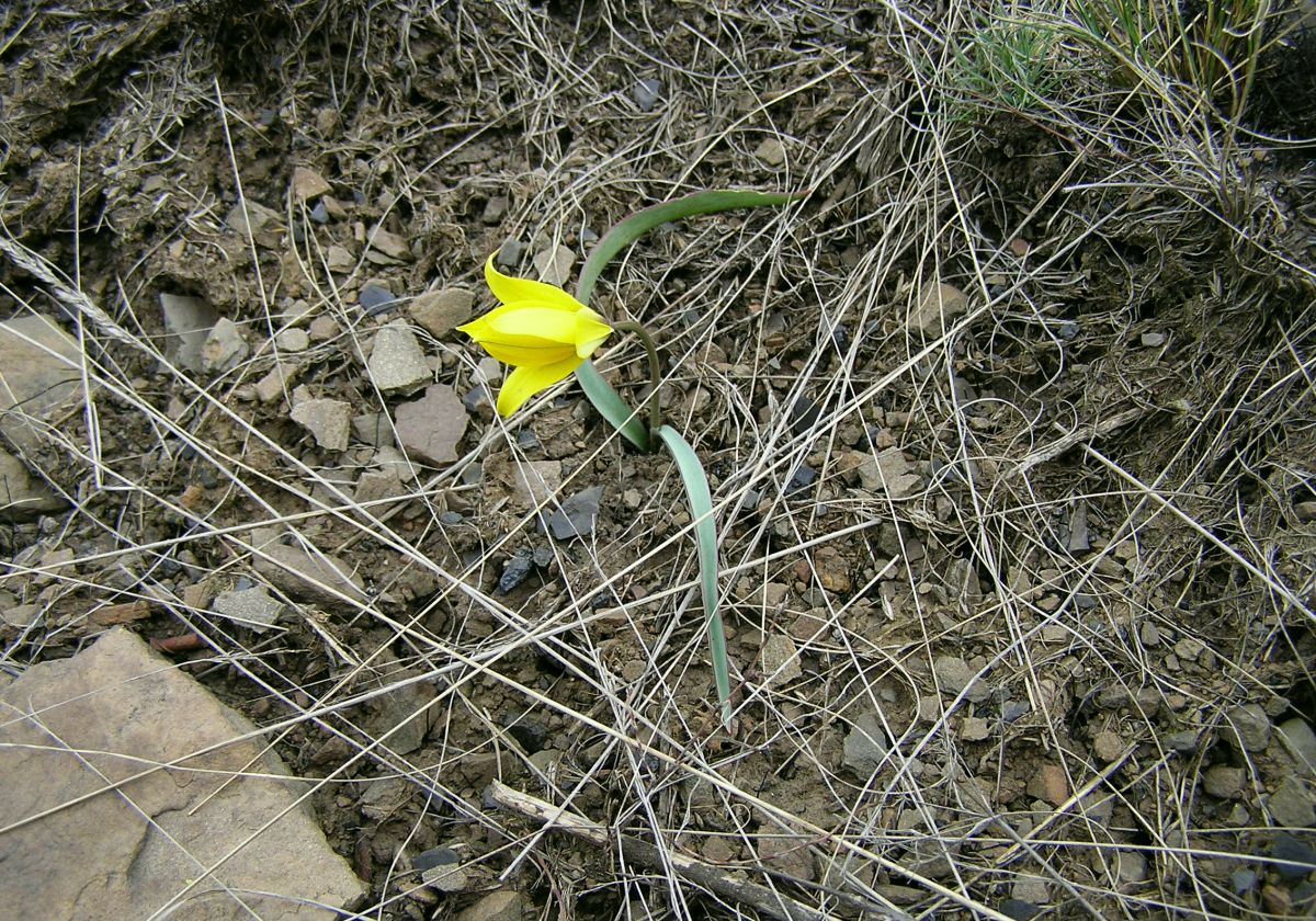 Іллірійський, Лутугинський район, Ілірійська сільська рада між с. Іллірія